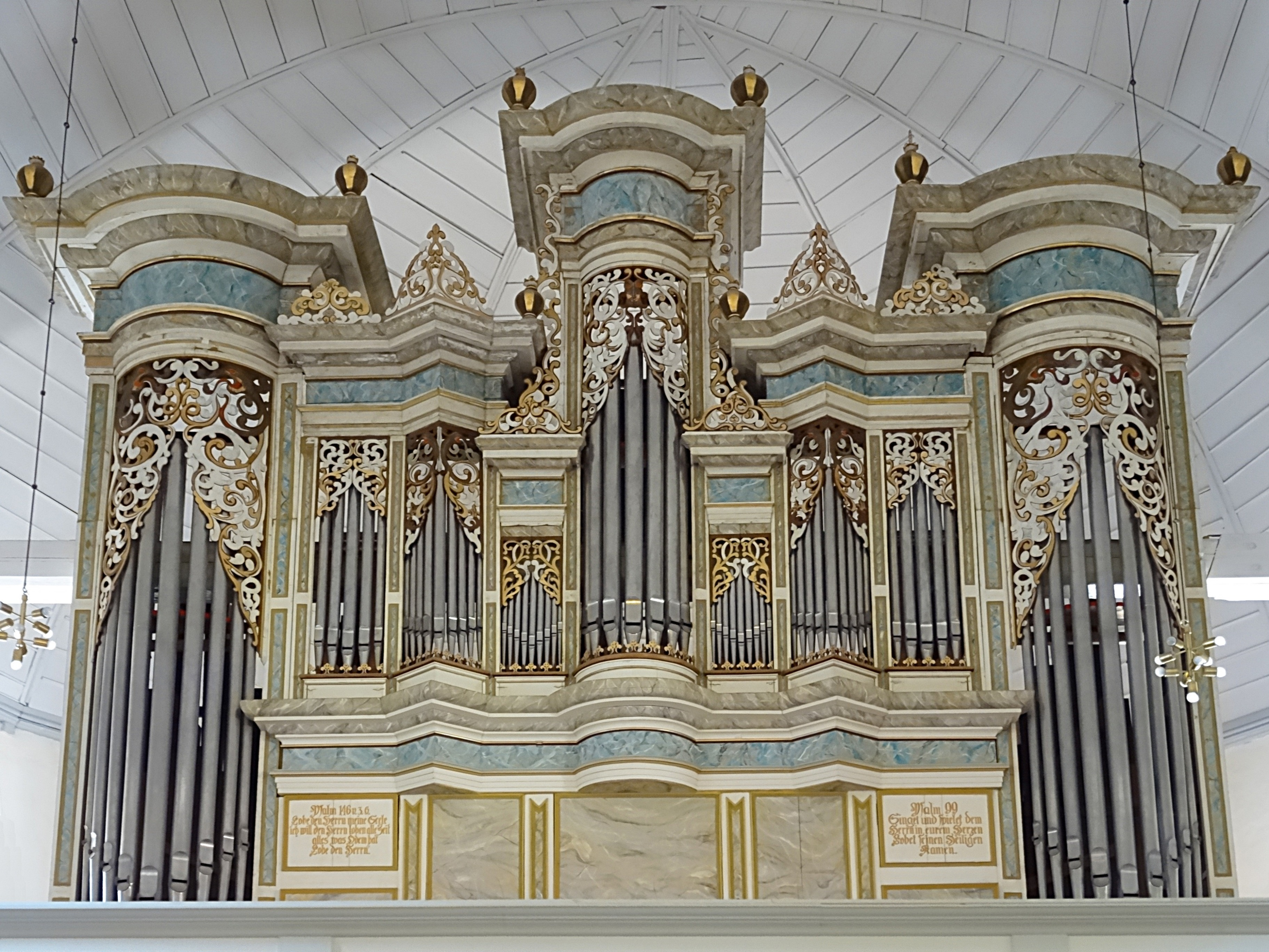 Die Orgel in der Marienkirche in Artern wurde 1744 von einem unbekannten Orgelbauer für die St. Nicolaikirche in Eisleben erbaut. 1880 wurde sie von Julius Alexander Strobel umgebaut und 1984 in abgewandelter Form von Gerhard Kühn an die Marienkirche in Artern überführt.